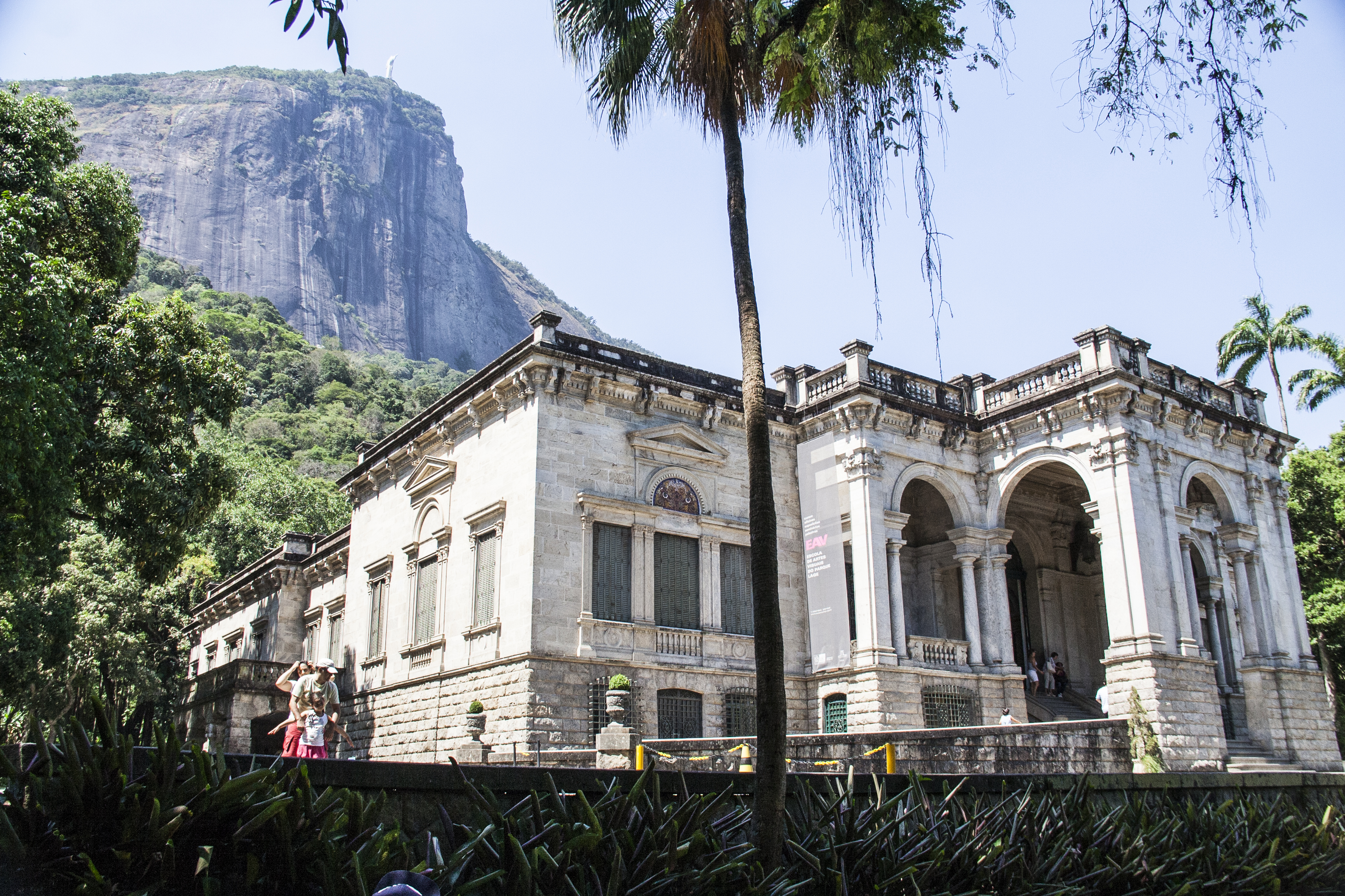 Parque Henrique Lage (Conjunto Paisagístico)